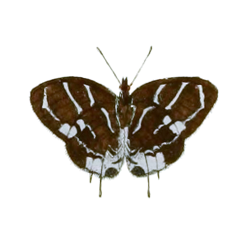 [Papilio] Lausus Cramer = Thereus lausus (Cramer, [1779])